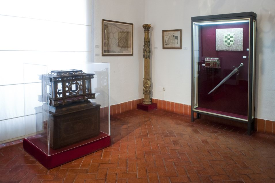 Sala del Museo de Valladolid dedicada la Historia de la Ciudad que expone la "espada del Conde Ansúrez" y la "Urna de cristal de roca"